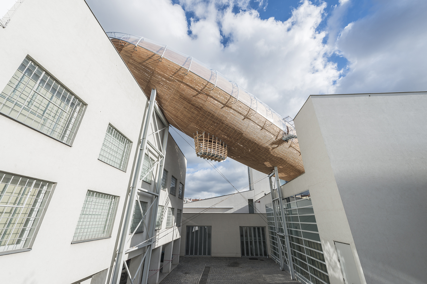 Centrum současného umění DOX se vzducholodí Gulliver, která byla otevřena pro veřejnost v prosinci roku 2016.